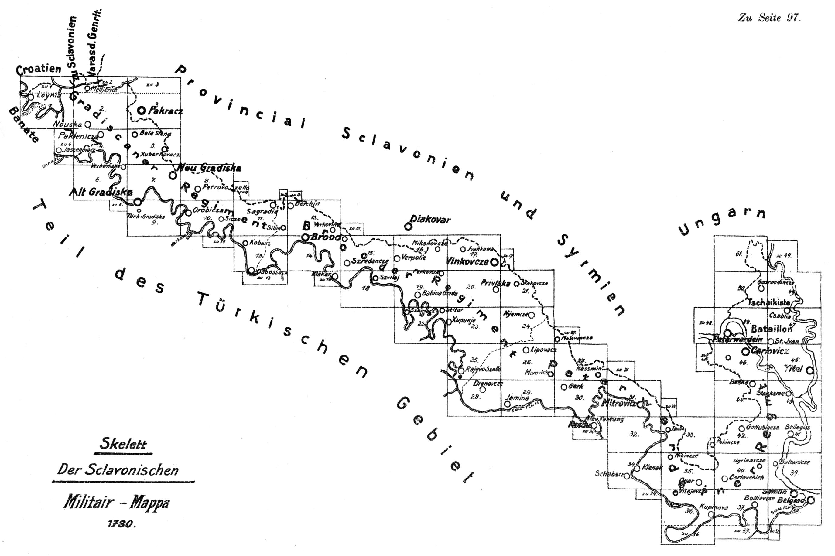 Harta generală a zonei graniţei militare slavone din hărţile iozefine, executată în anul 1780.